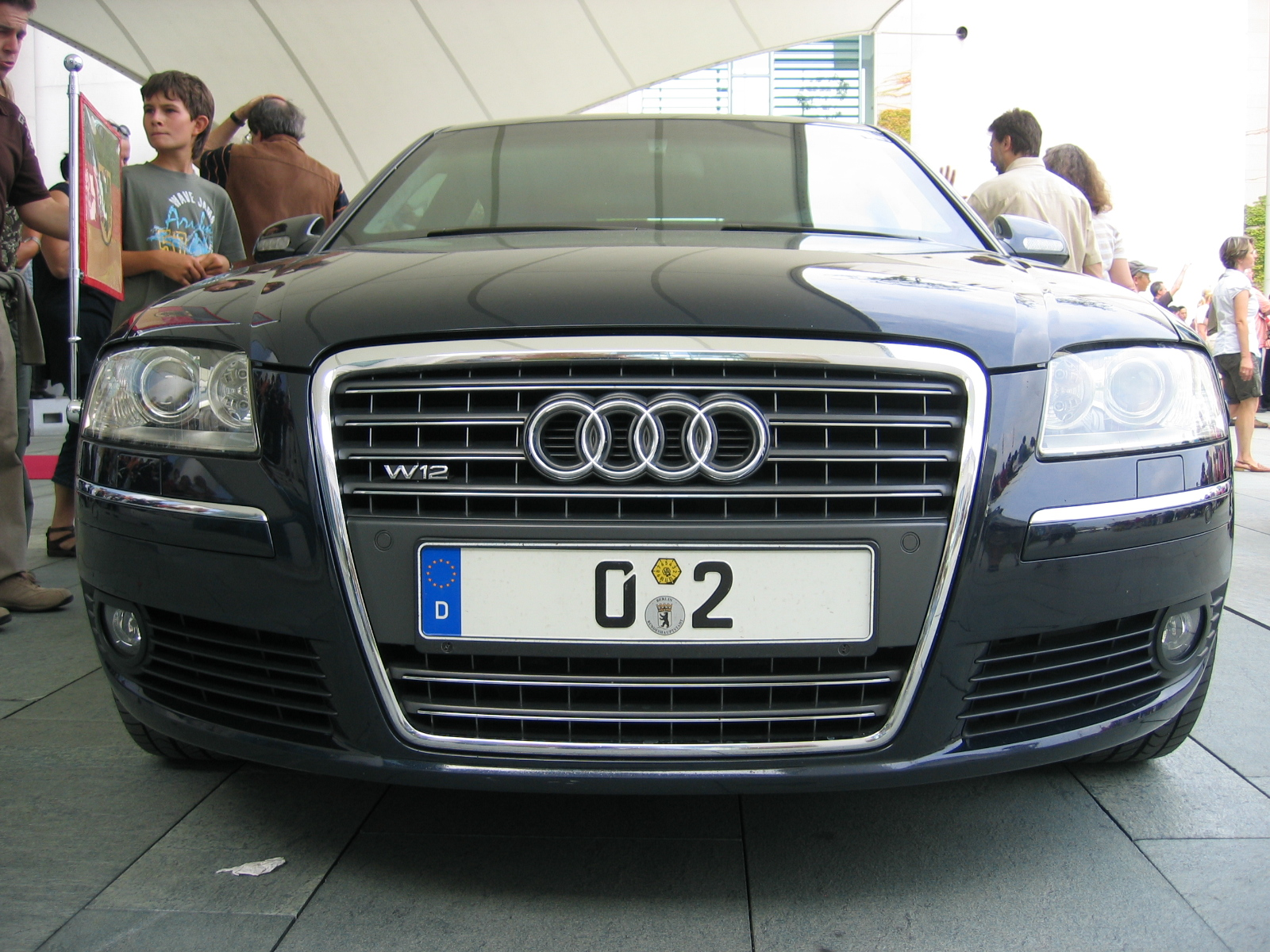 Der Audi A8 W12 der Bundeskanzlerin Frau Dr. Merkel mit dem Kennzeichen 0-2.